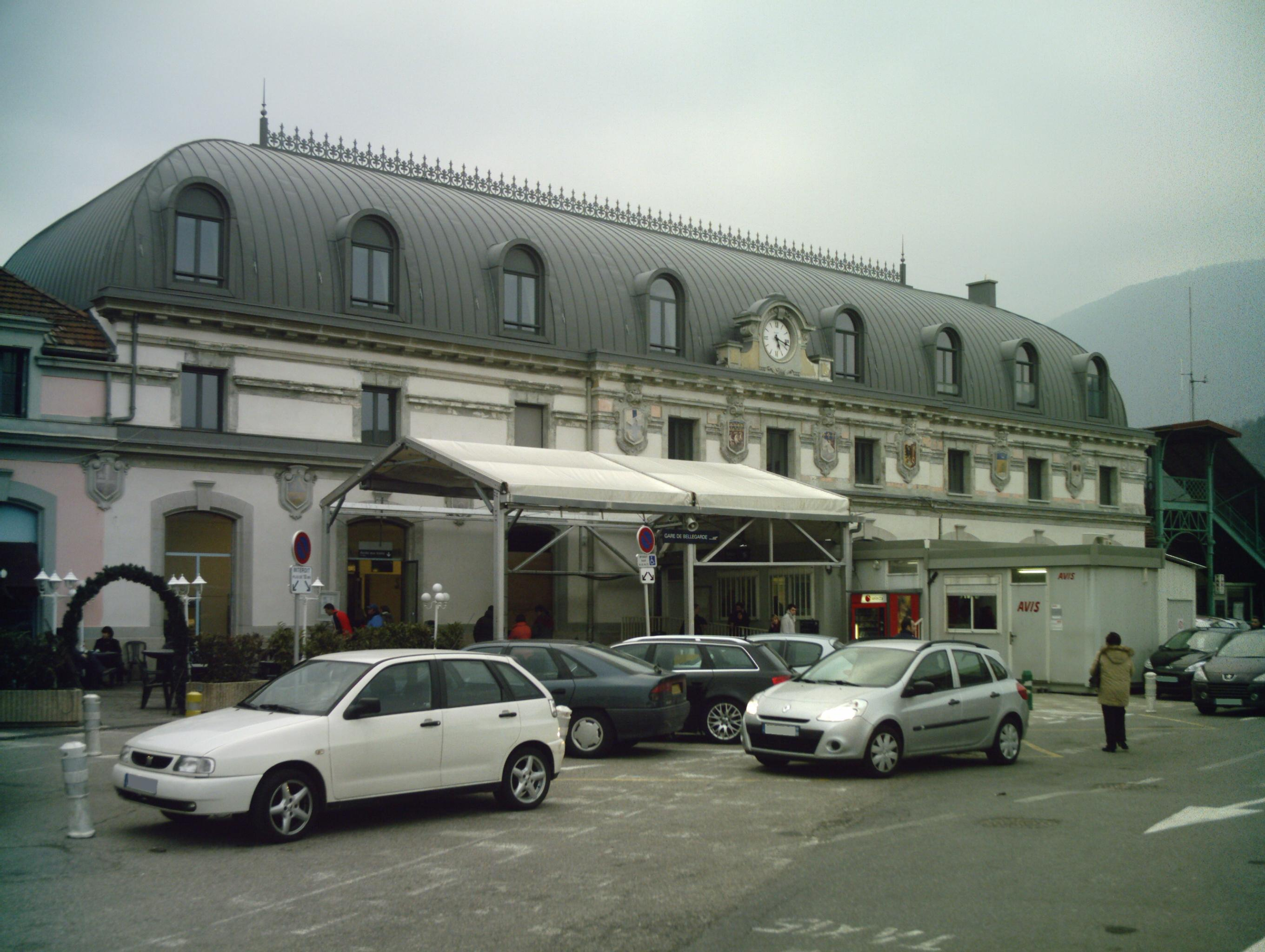 Façade extérieure du second bâtiment voyageur de la gare de Bellegarde-sur-Valserine fermé en 2010